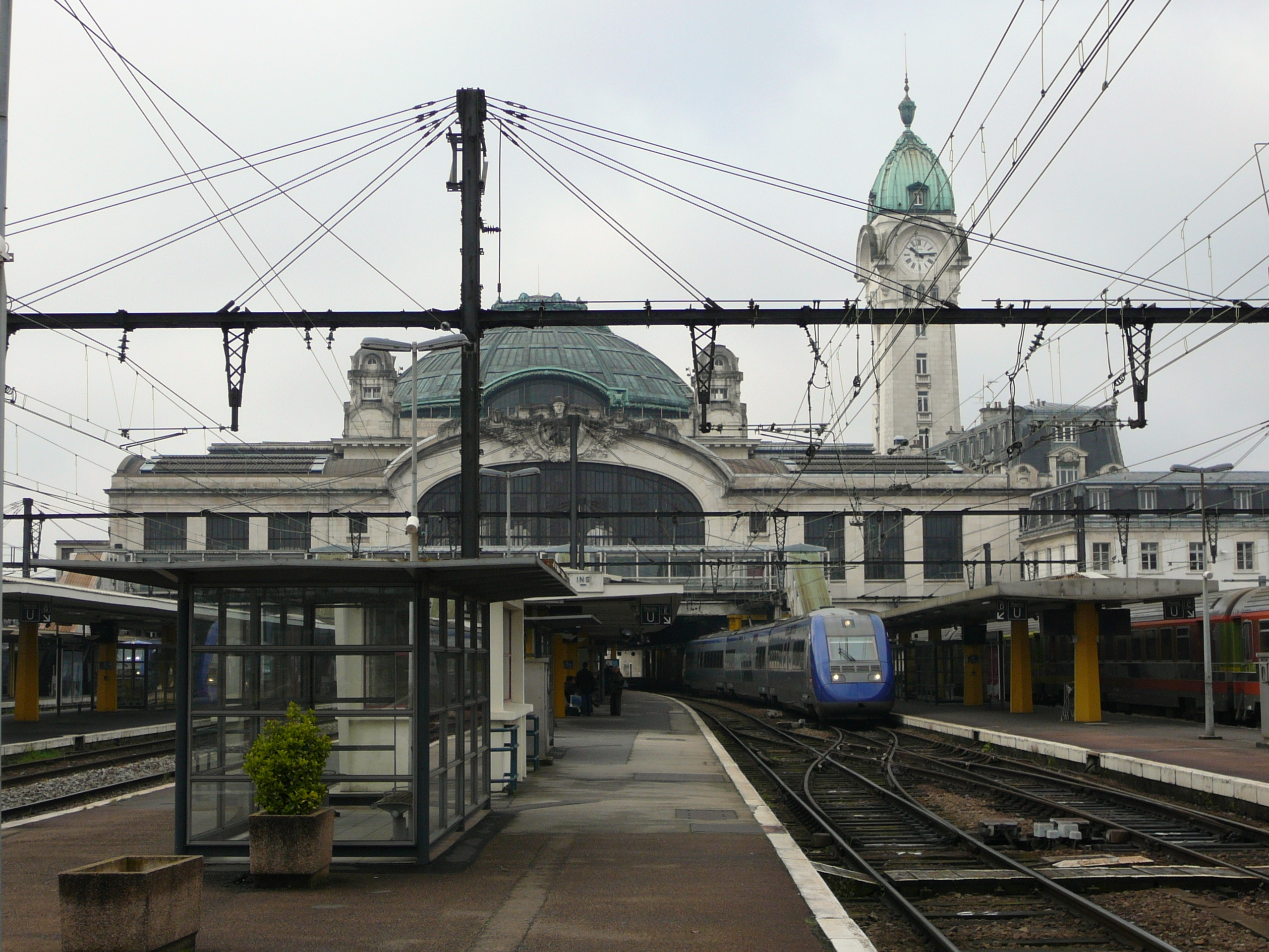 Gare de Limoges vue des voies